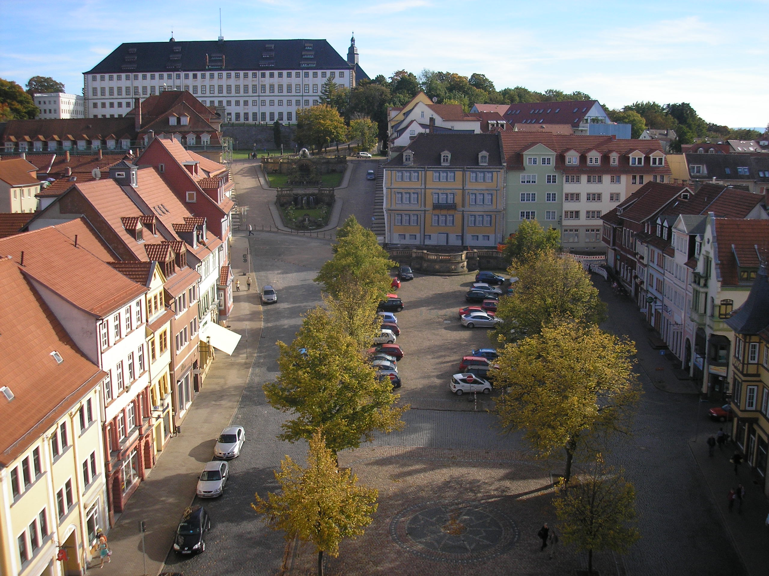 Blick vom Rathausturm über den Schlossberg in Gotha (Thüringen).